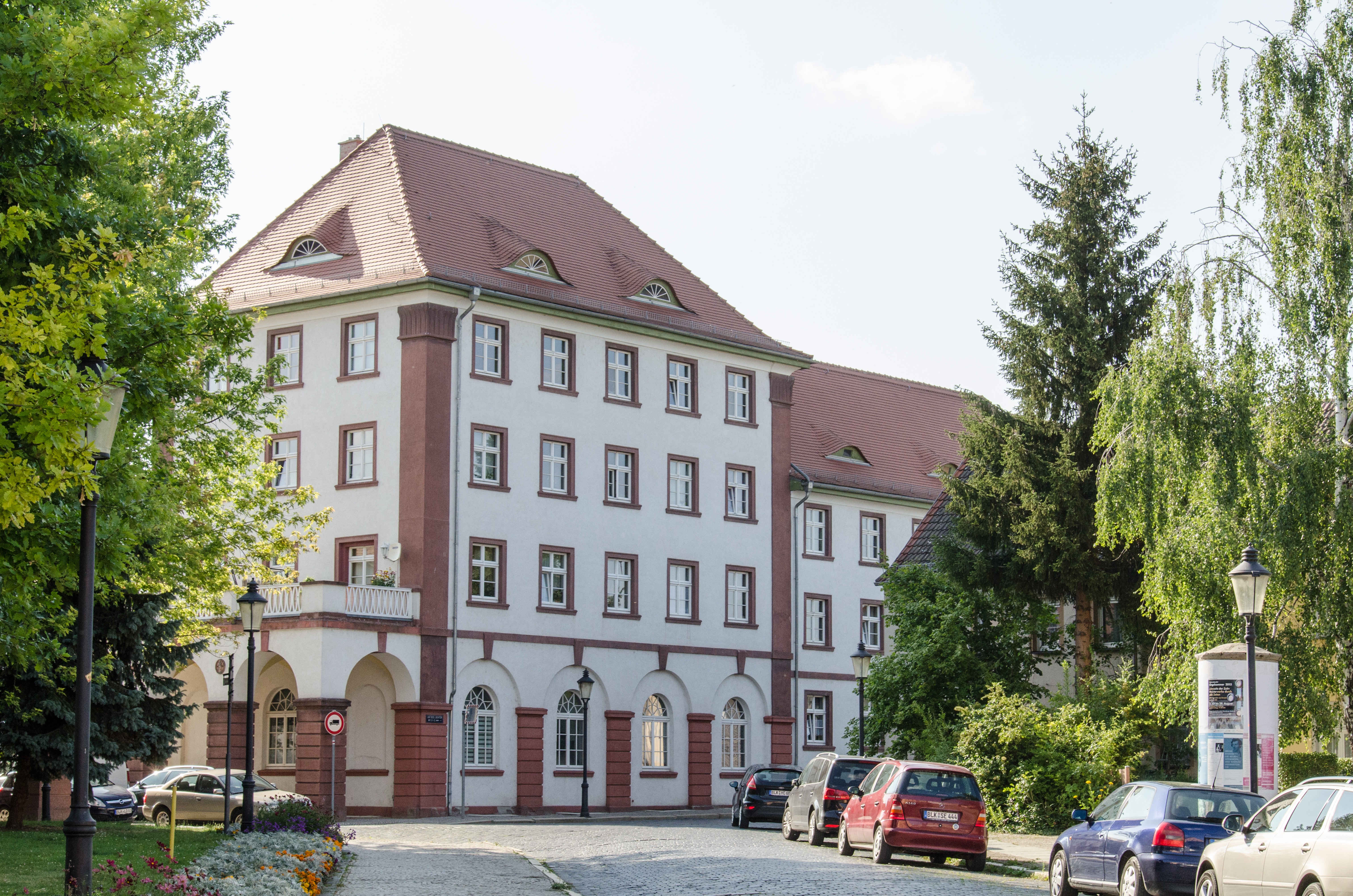 Naumburg, Am Georgentor 8